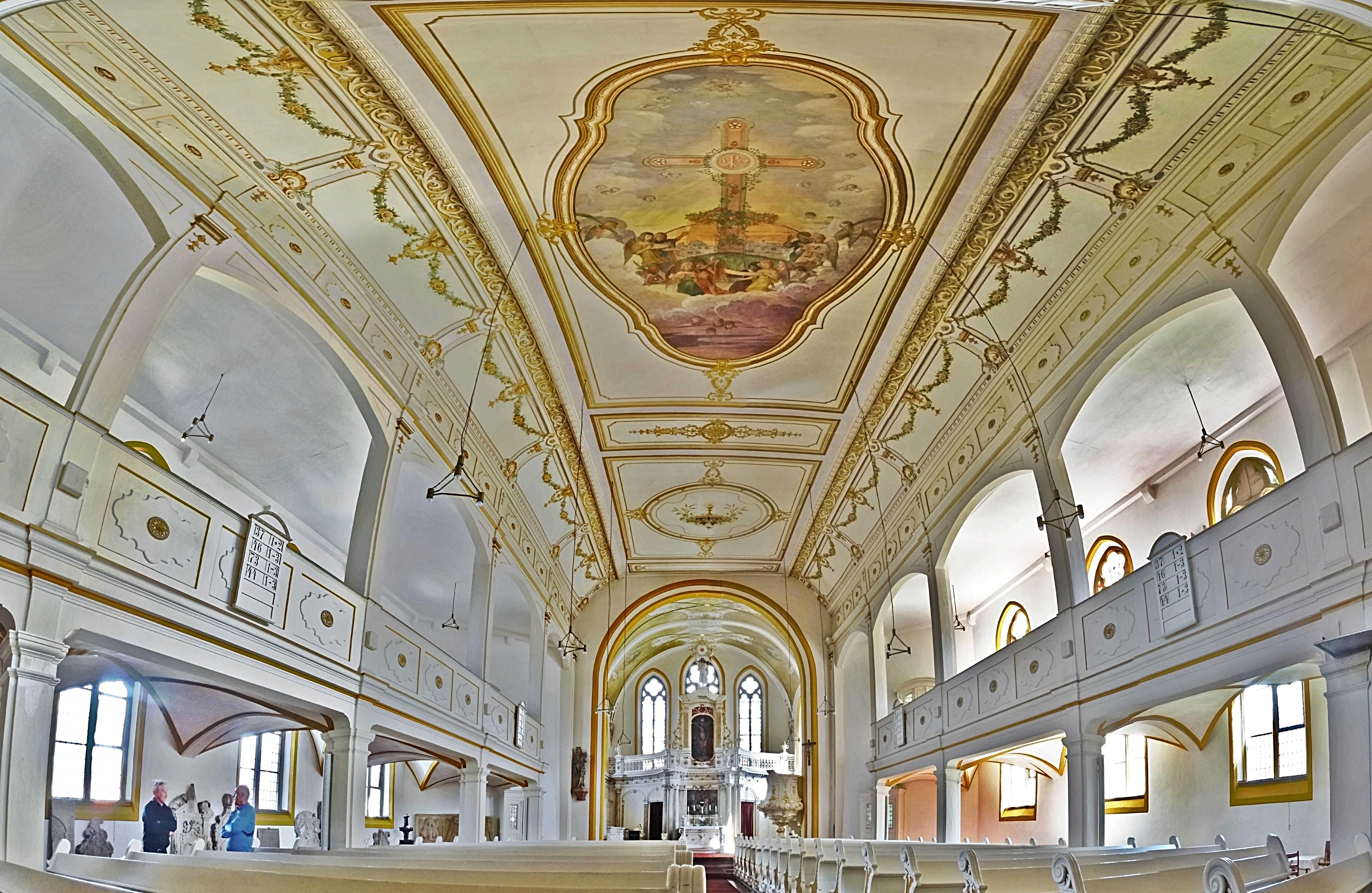 Innenraum Panorama Stadtkirche St. Marien Stadtilm, Blick nach Osten